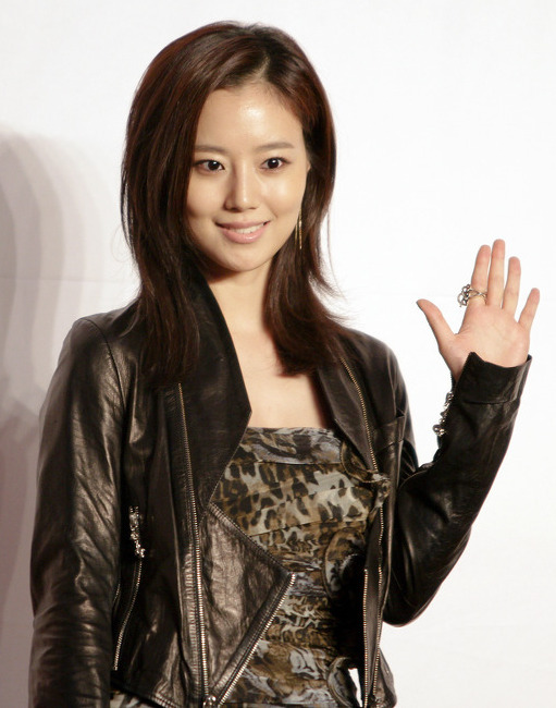 2012년 9월 5일 착한남자 제작 발표회에서.